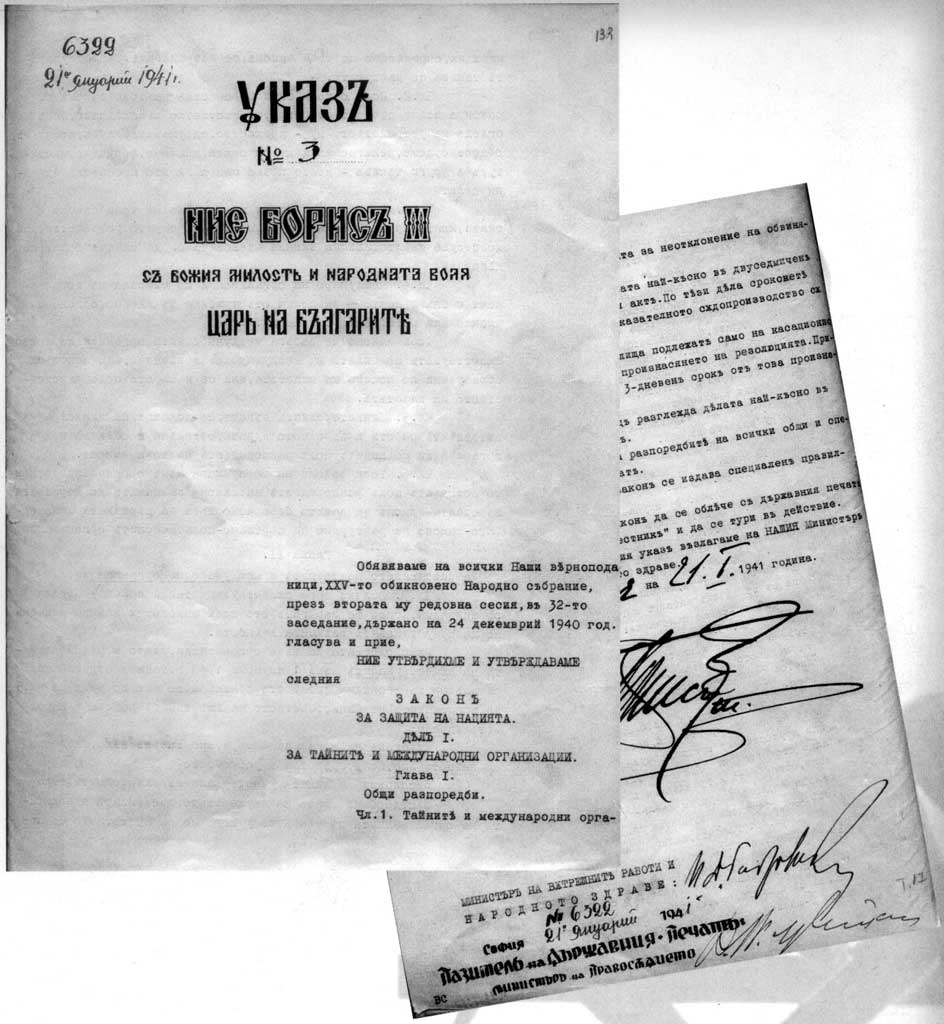 Закон за защита на нацията.